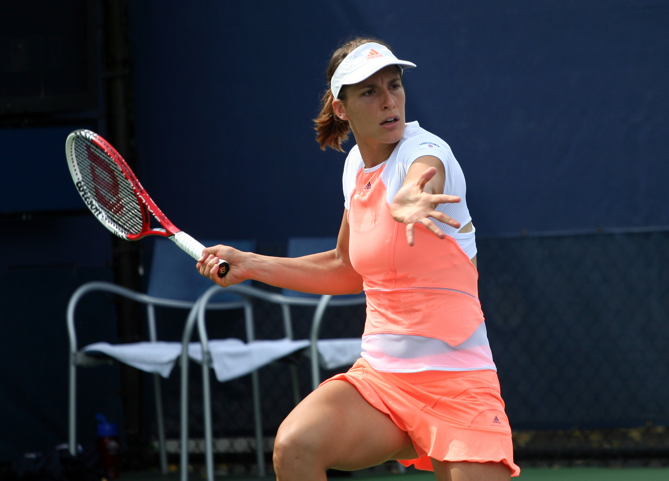 US Open - Friday, August 30, 2013